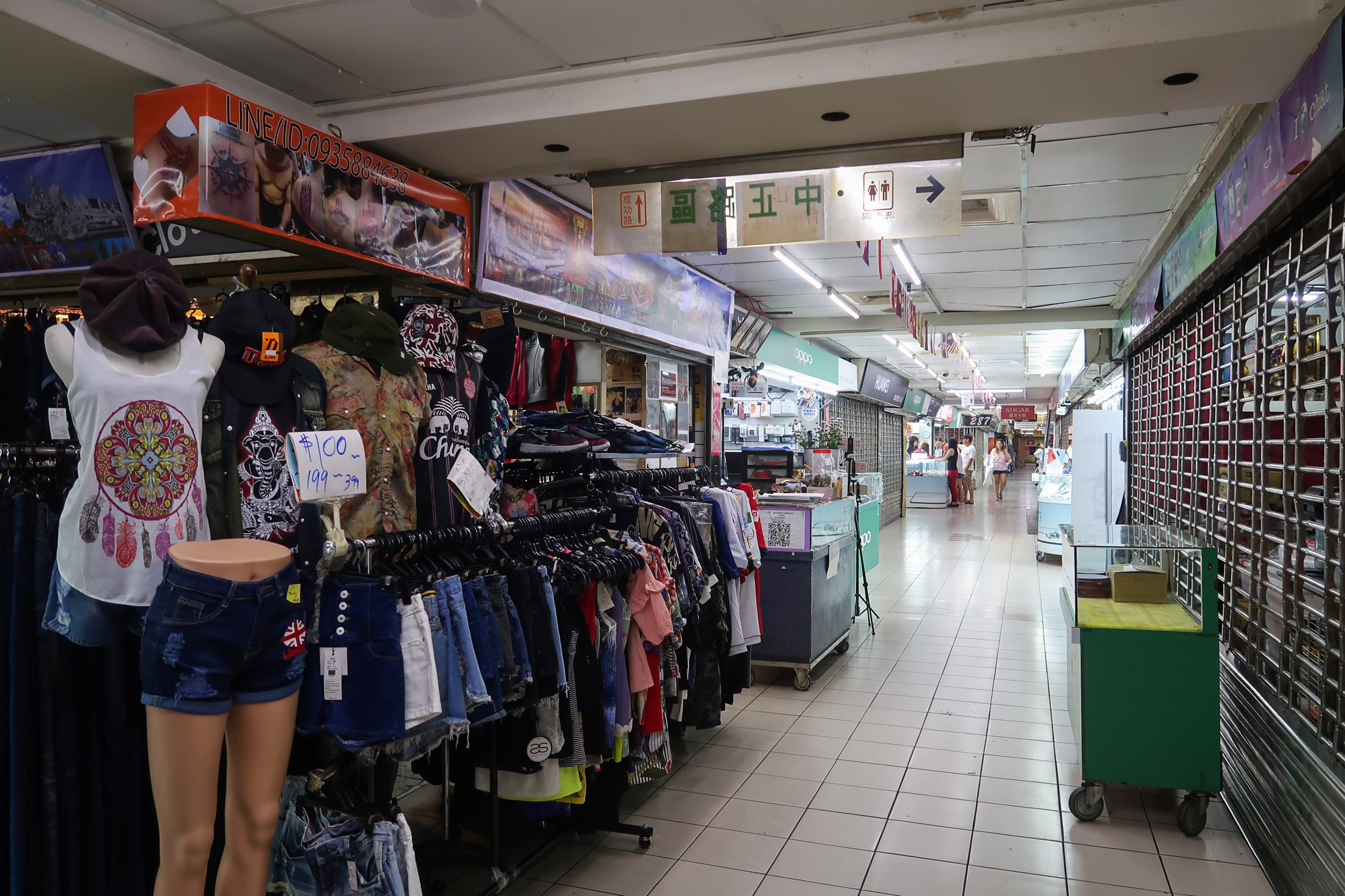 ASEAN Square Level 3